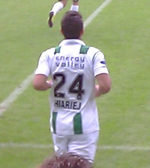 Tom Hiariej bij FC Groningen